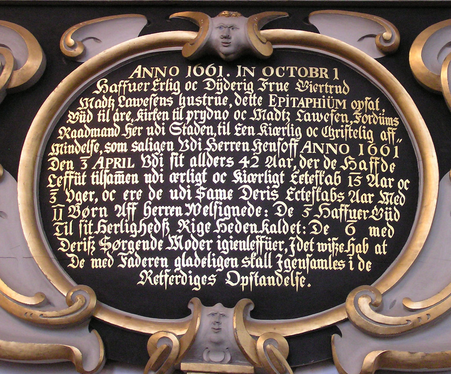 Udenfor Trefoldighedskirken i Kristianstad, Skåne: Epitafie-indskrift på dansk